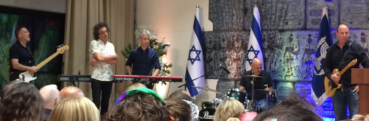 להקת נאג' חמאדי מופיעה בבית הנשיא ביום האחדות